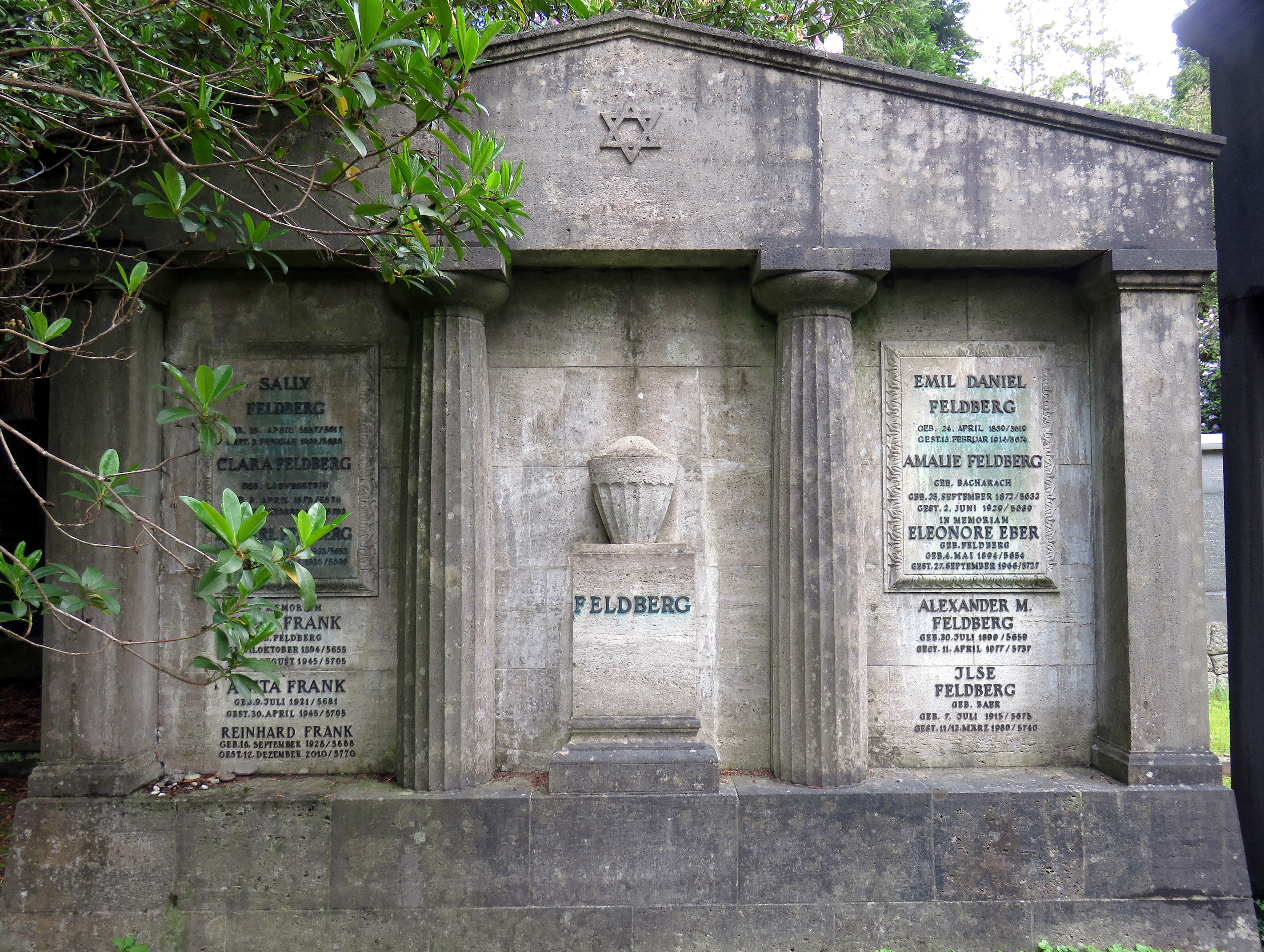 Grabstätte Feldberg, Jüdischer Friedhof Ohlsdorf, Planquadrat A10-725, für den Hamburger Tuchhändler Emil Daniel Feldberg und seine Familie. Dort wird auch seiner 1966 in London verstorbenen Tochter, der Malerin Lore Feldberg-Eber gedacht. Das Grabmonument wurde vom deutschen Bildhauer Paul W. Henle geschaffen.